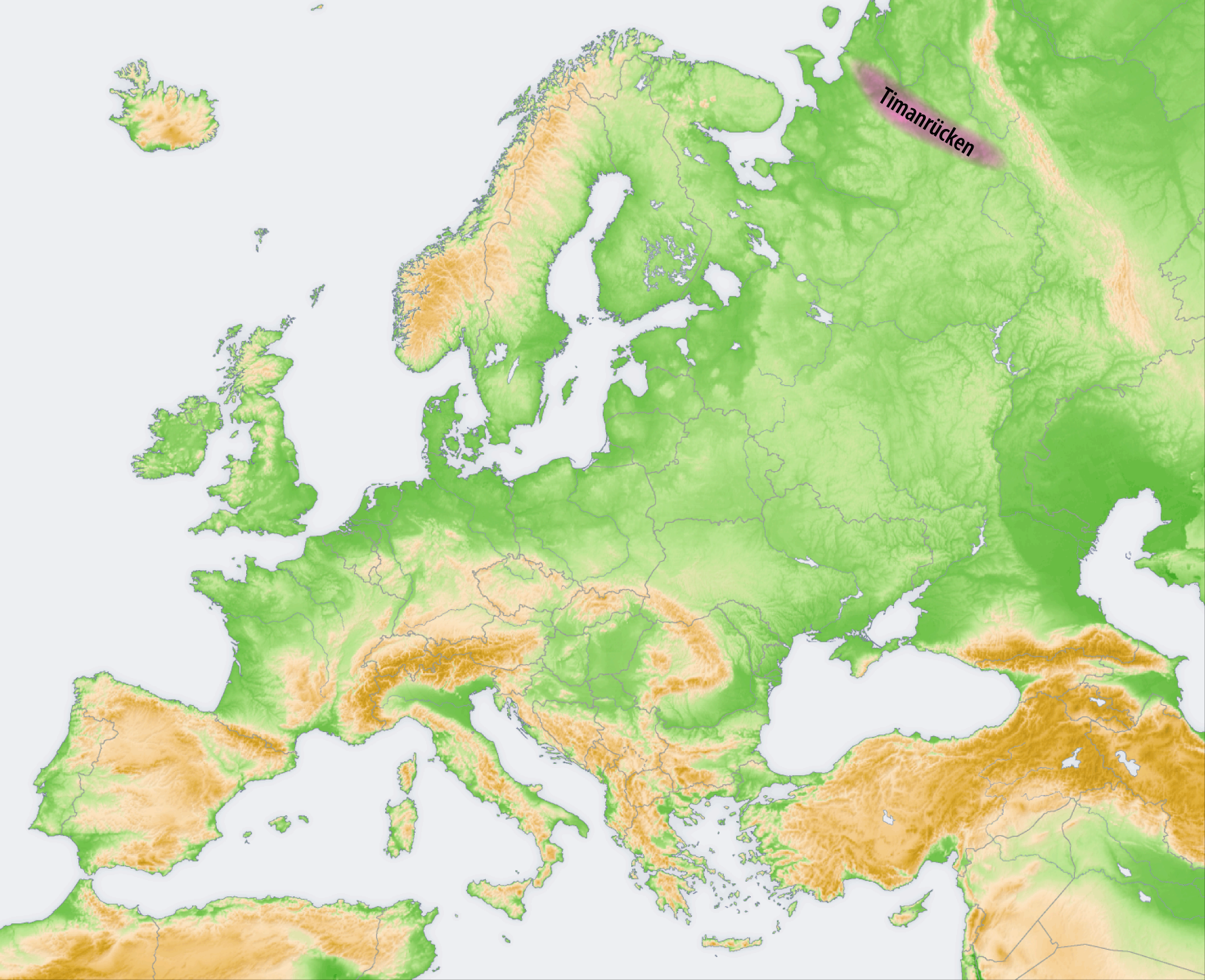 Landschaften der Osteuropäischen Ebene: Timanrücken